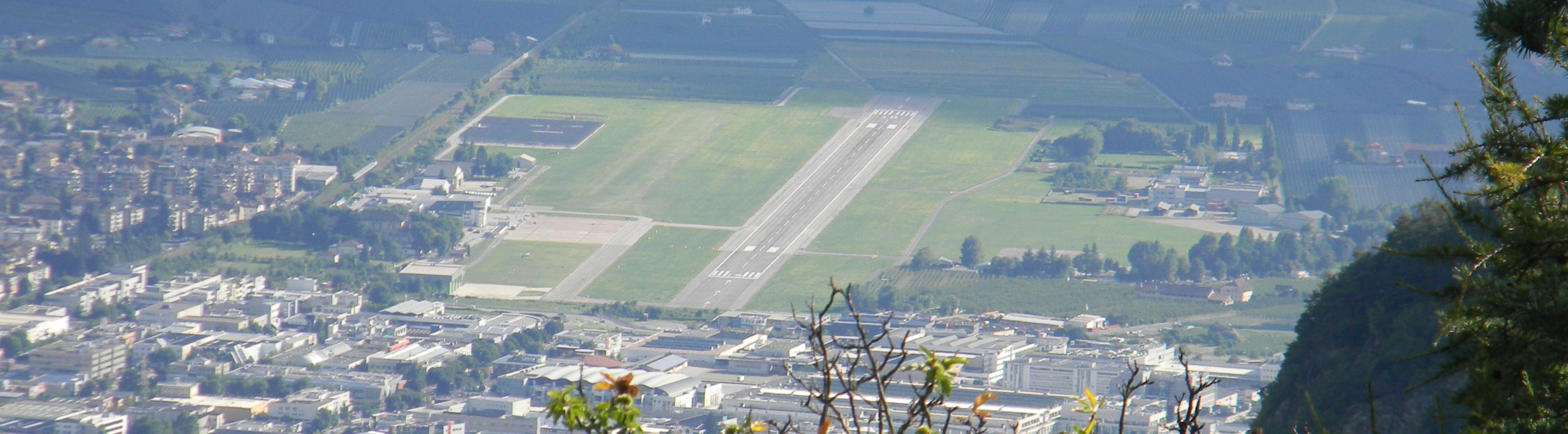 Bozen — Flughafen